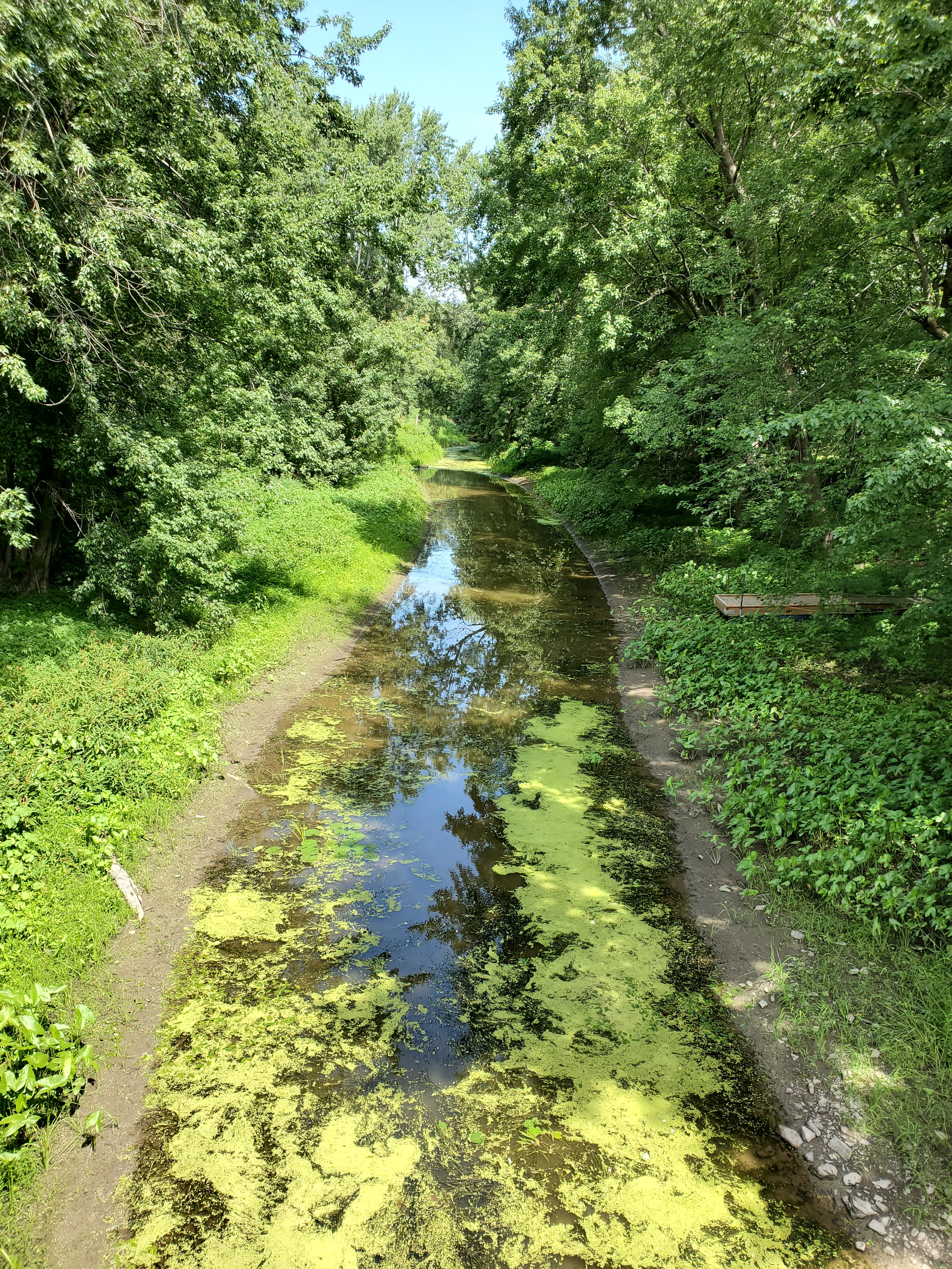 Chenal reliant la rivière l'Acadie et le bassin de Chambly.